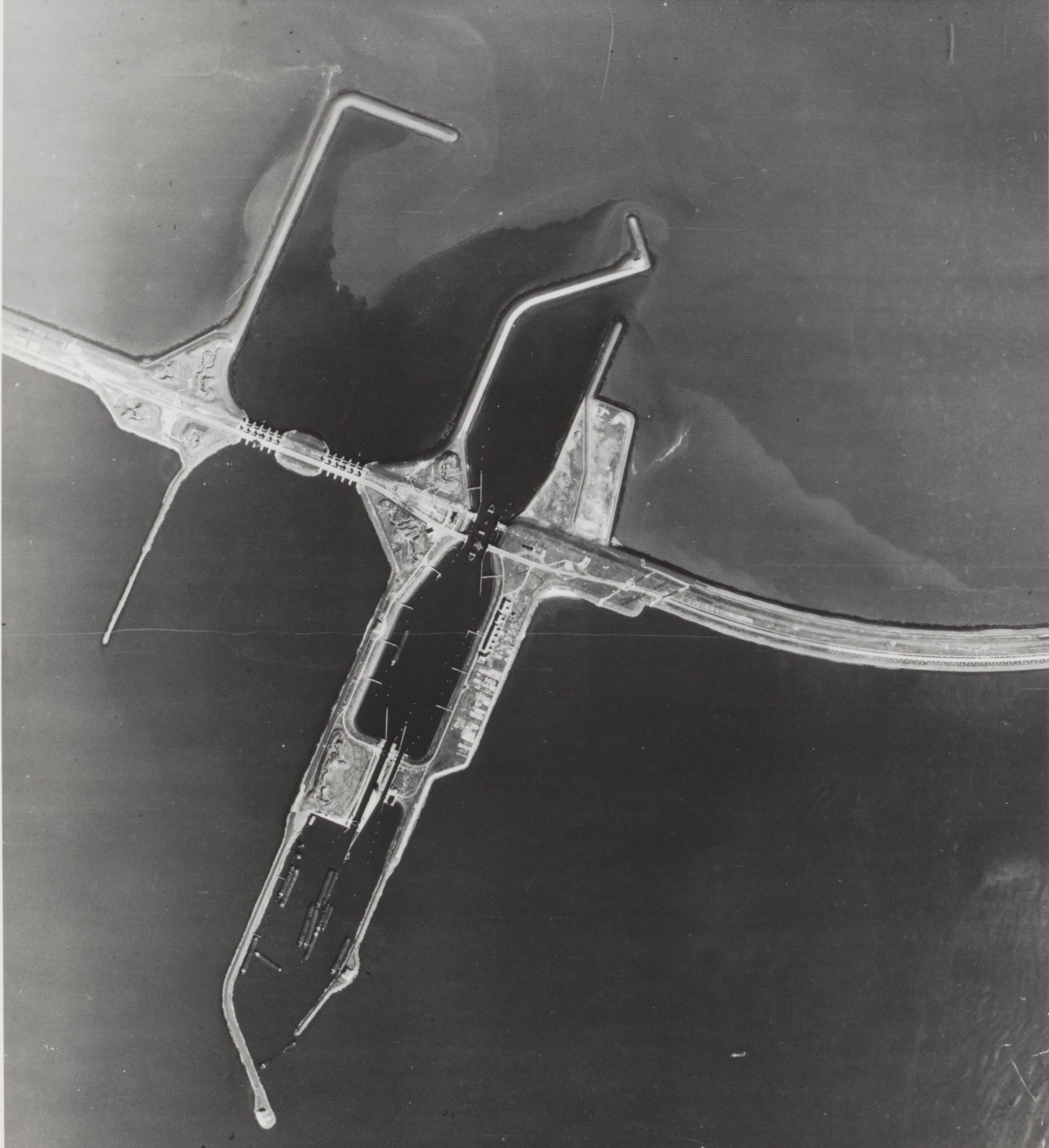 Luchtopname. De forten bij Kornwerderzand op de Afsluitdijk